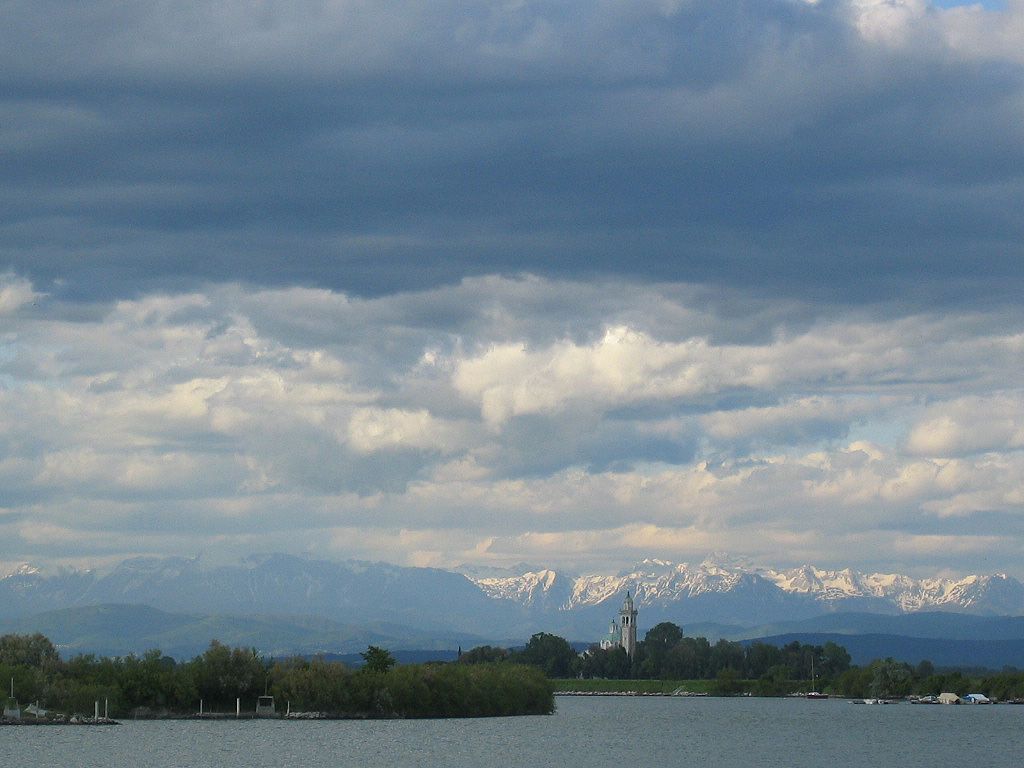 Laguna di Grado, 2004